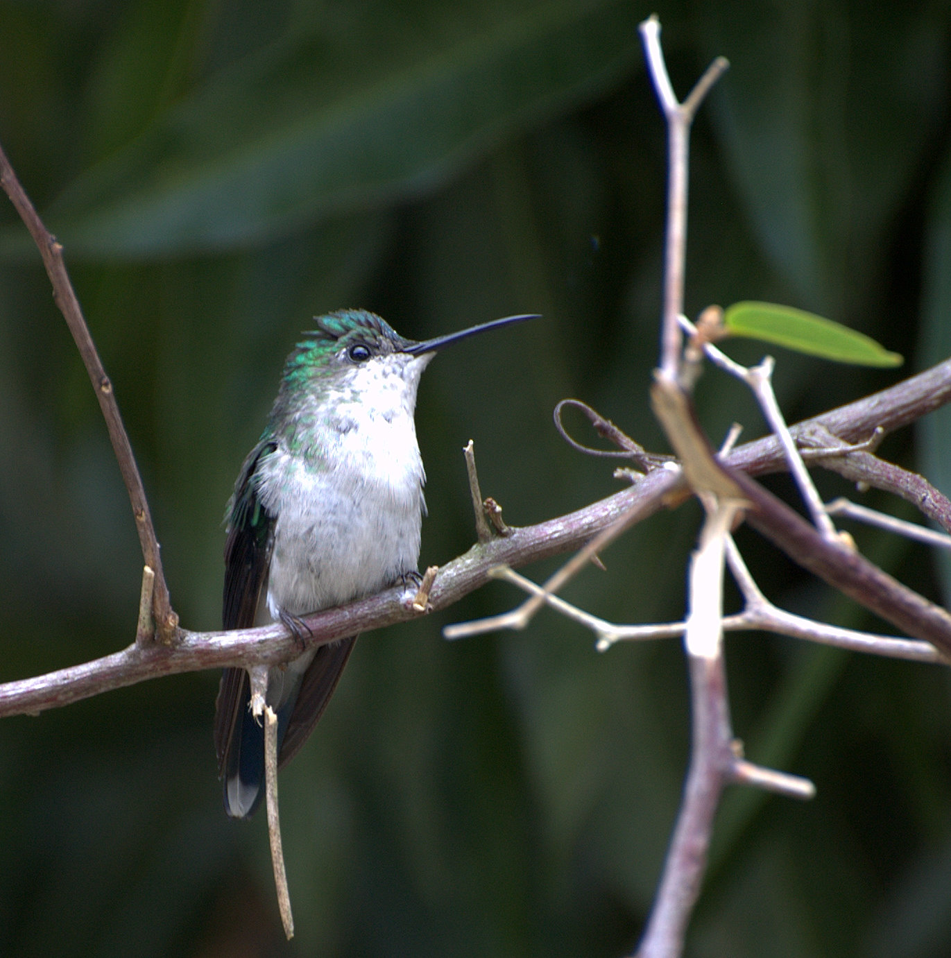 Ilhabela-SP